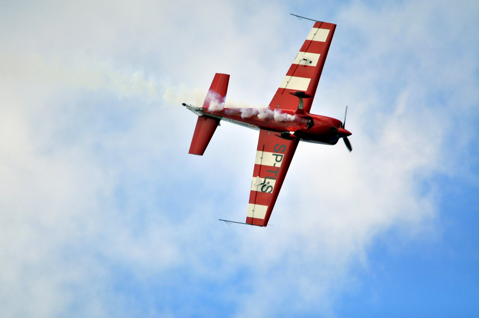 Artur Kielak za sterami Extra 330 LC ( SP - TLS ), podczas II Festynu Lotniczego w Michałkowie pod Ostrowem Wlkp.